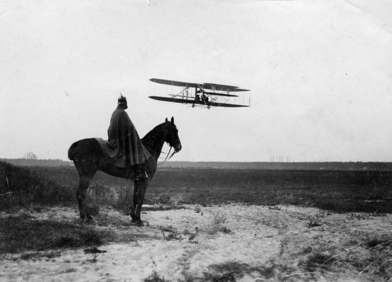 Kap[itän] Engelhardt im Flug, Johannistal bei Berlin, 12.8.1910, [Aufnahme] Otto Haeckel , Berlin-Friedenau, Wieland-Strasse 35